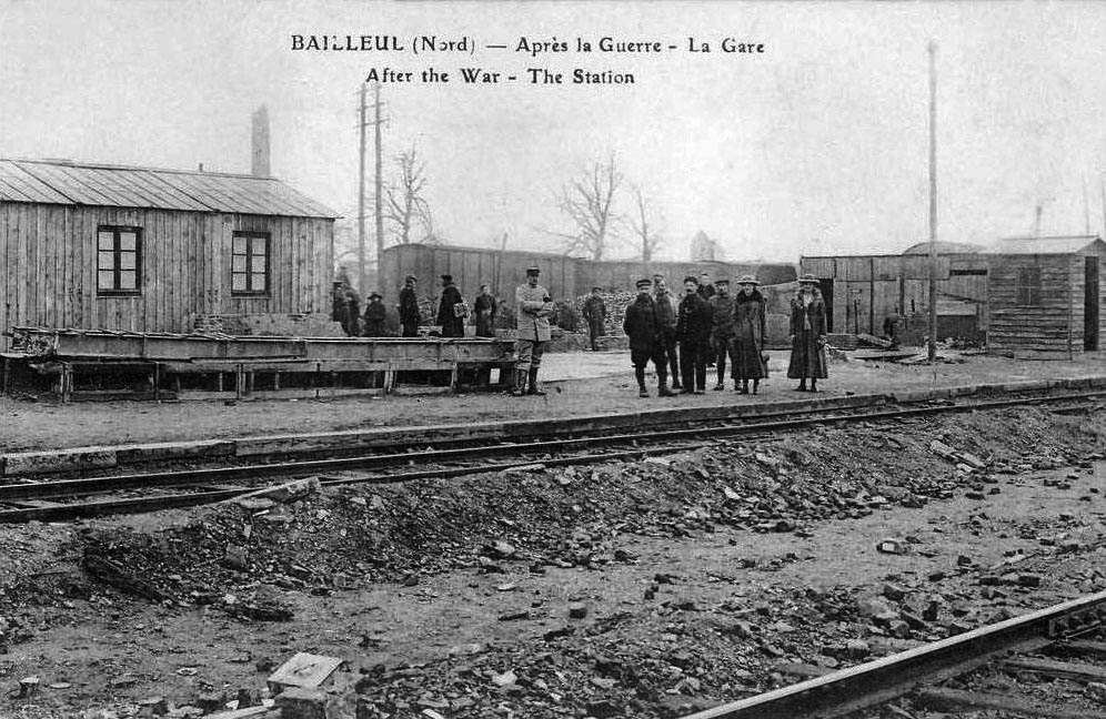 Après la guerre de 1914 - 1918, la gare provisoire de Bailleul.